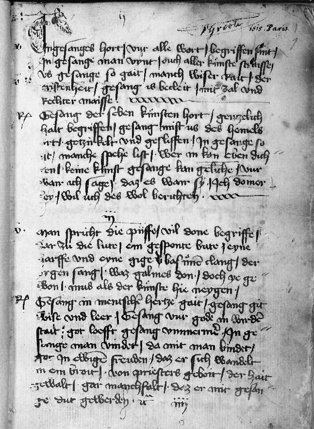 Muskatblut, Lieder - Köln, Hist. Archiv der Stadt, Best. 7020 (W*) 8, Bl. 1r